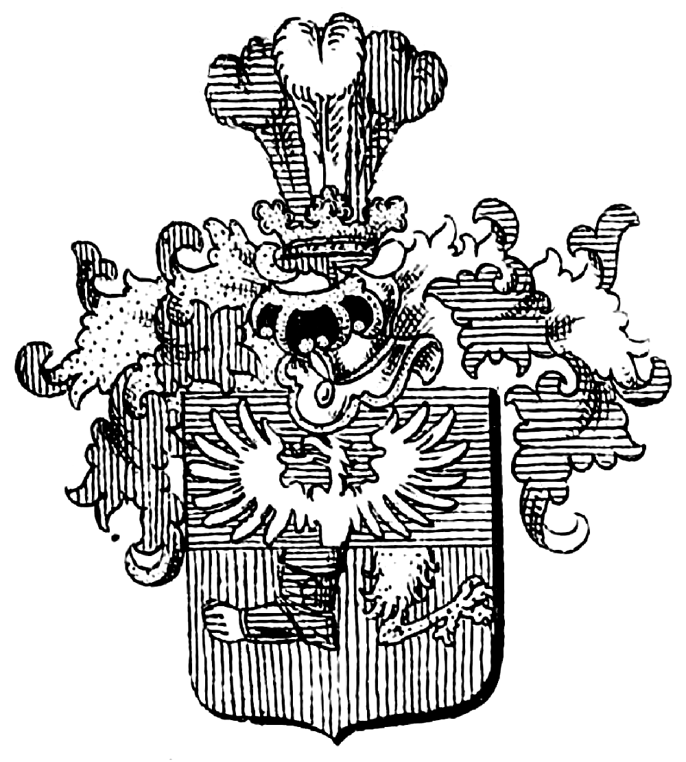 Wappen derer von Uthmann und Rathen